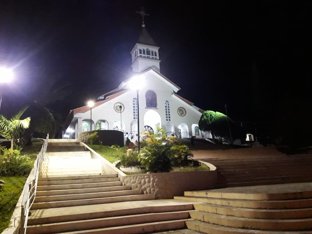 La Iglesia se encuentra al frente del Parque Central